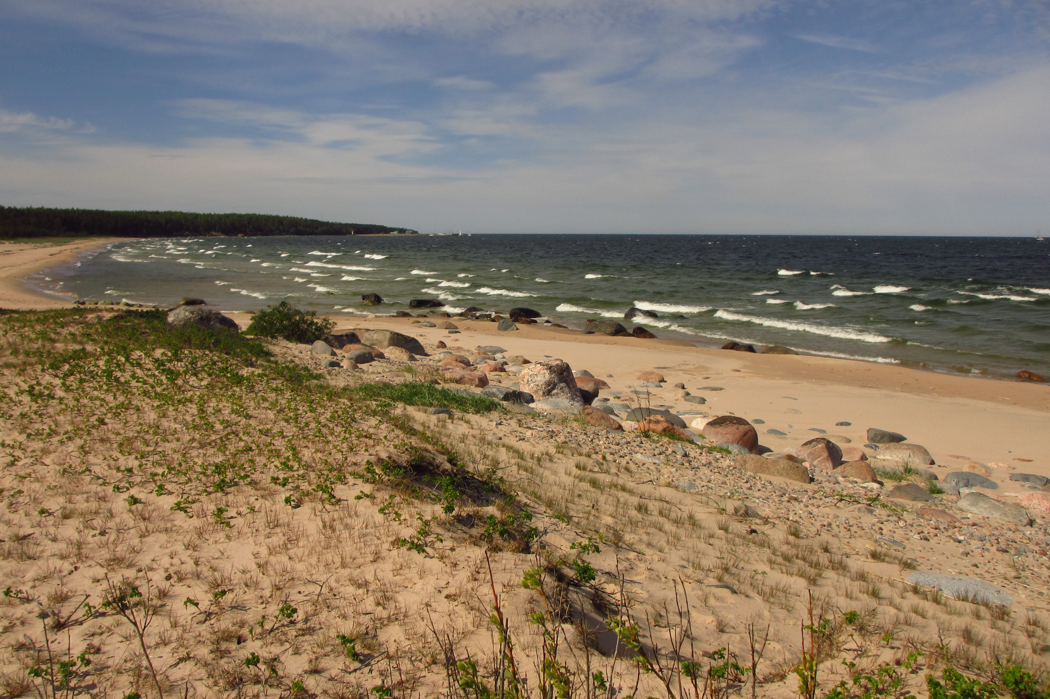 Hülgekari rand Naissaare MKA